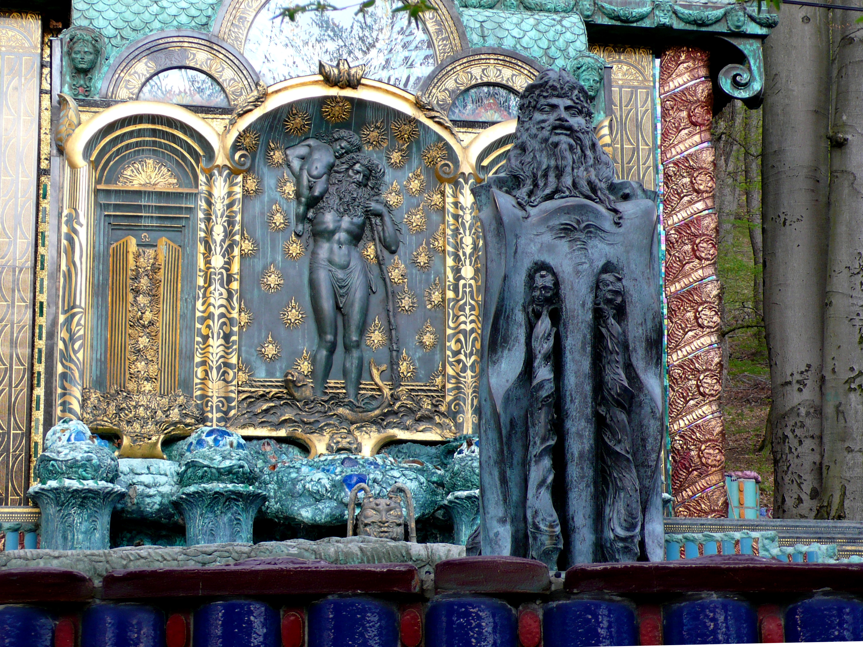 Erste Wagner Villa, Wien, Nymphäum Omega (Ernst Fuchs)